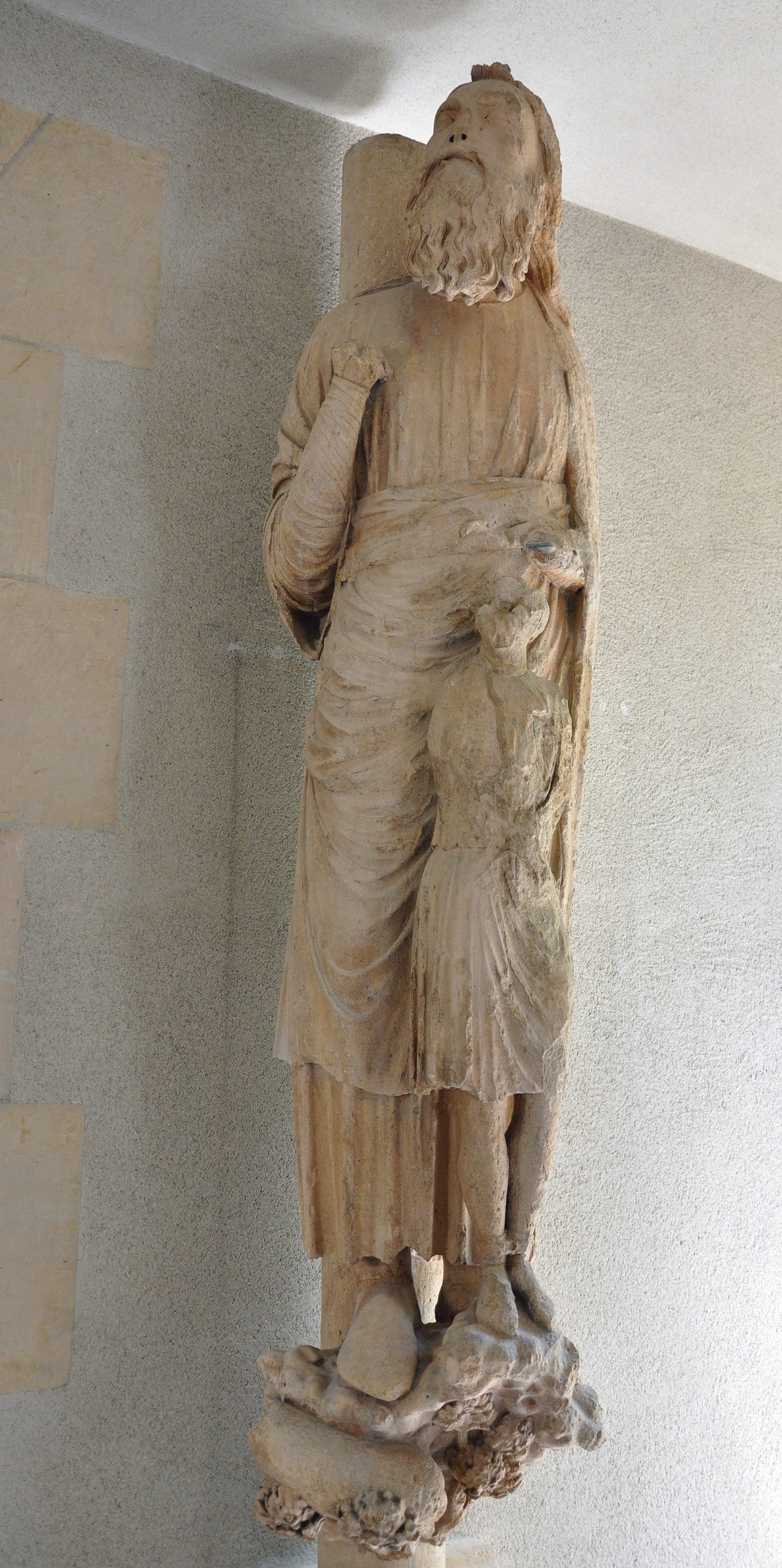 Statue d'Abraham (1215 environ). Il s'agit d'une statue originale de la Cathédrale de Reims provenant du portail Sud de la façade, déposée et désormais exposée au Palais du Tau.